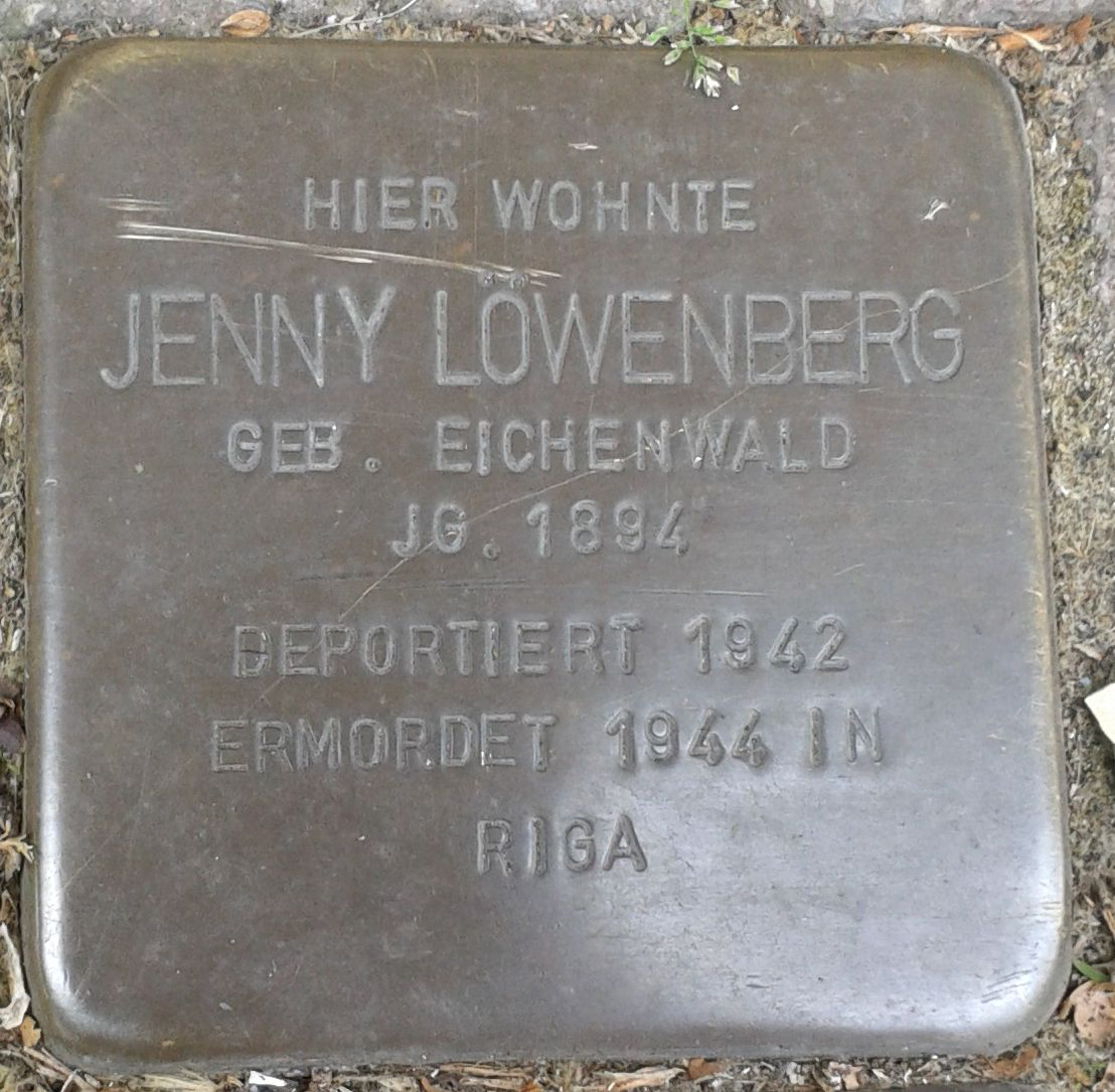 Stolperstein Datteln Marktstraße 5 Jenny Löwenberg